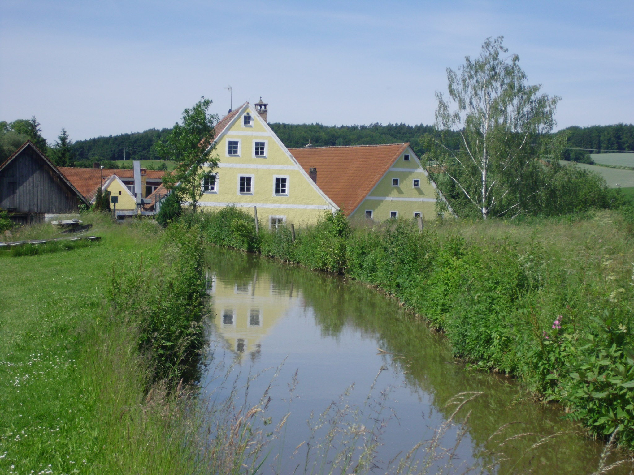 Die Hasenmühle, Ortsteil des Marktes Heidenheim im mittelfränkischen Landkreis Weißenburg-Gunzenhausen